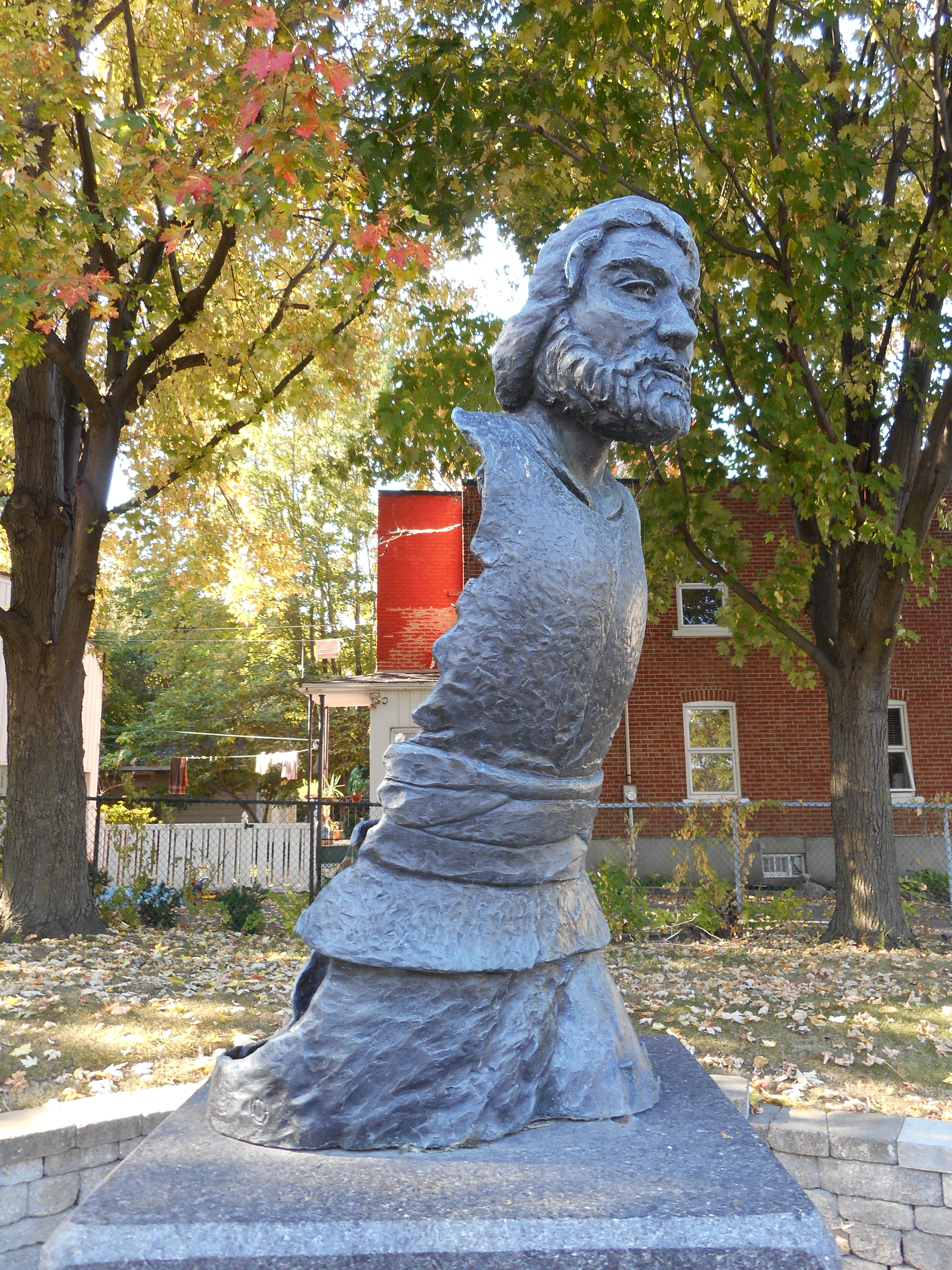 Le monument de Charles Le Moyne, réalisé par Luc Laramée, a été inauguré le 30 septembre 2001. Il est situé à l'ouest du chemin de Chambly, à l'intersection de la rue Sainte-Élizabeth. il relève d'une initiative de la Société historique et culturelle du Marigot. marigot.ca